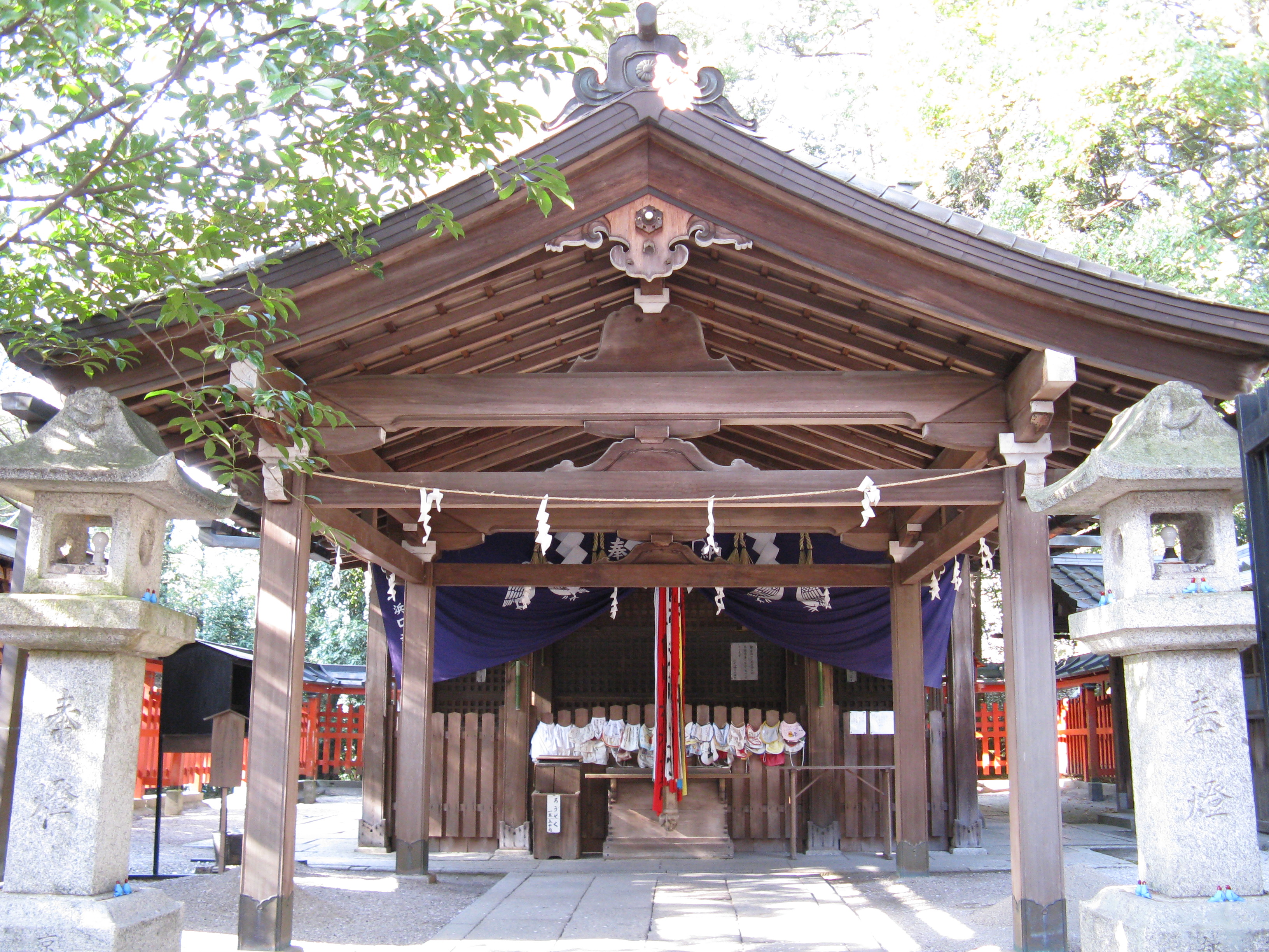 三宅八幡宮 拝殿